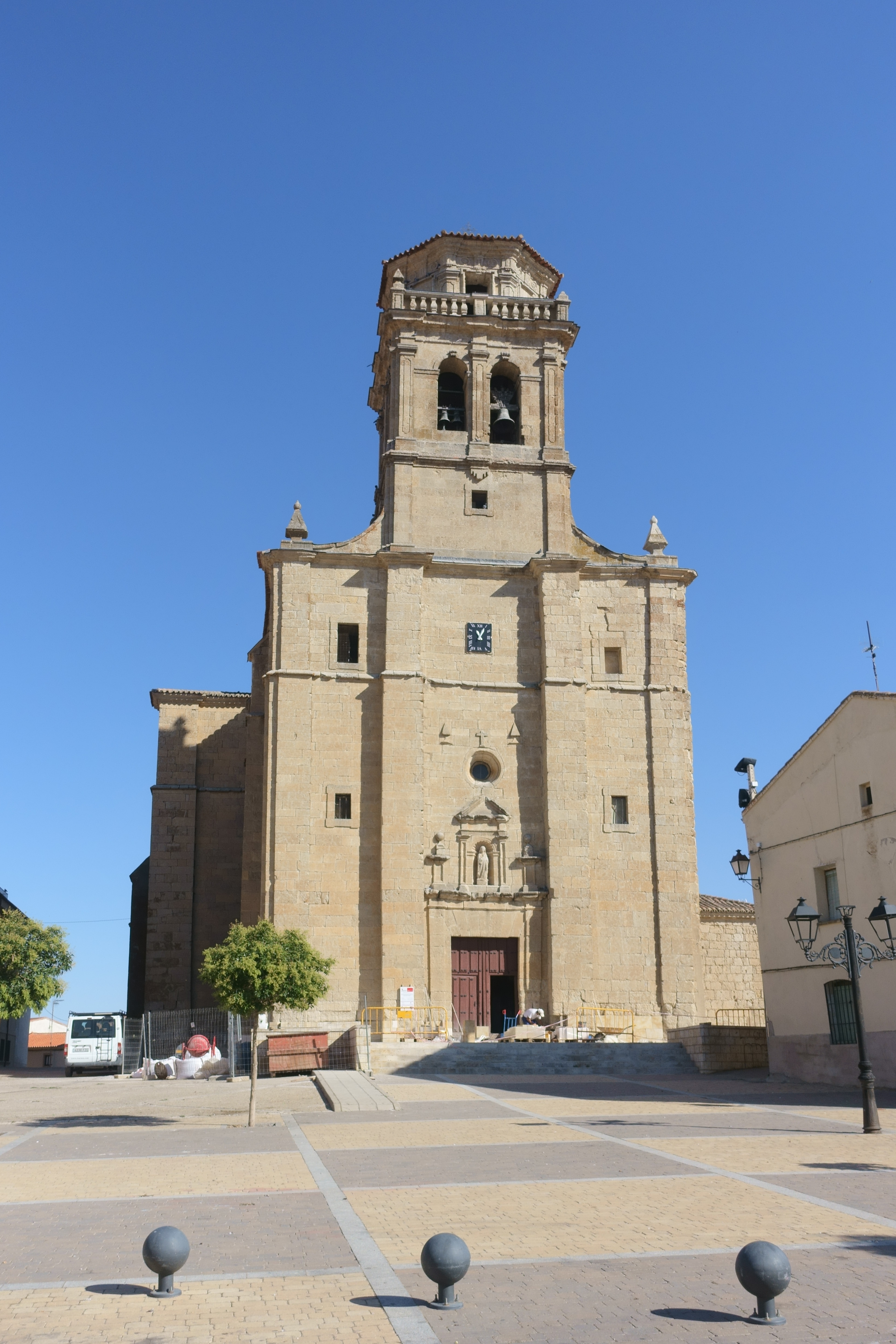 Iglesia de Santa María del Castillo, Fuentesaúco (Zamora, España).